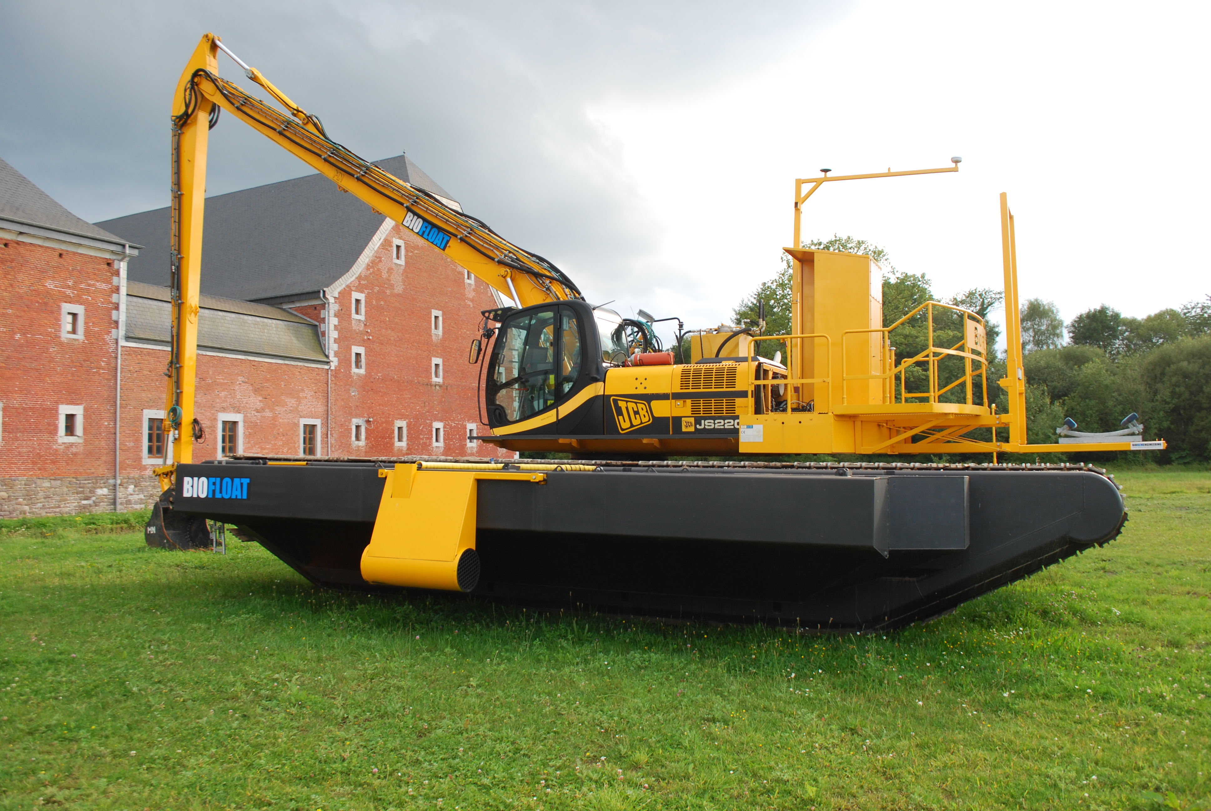 Vue du château de Neuville en Condroz.